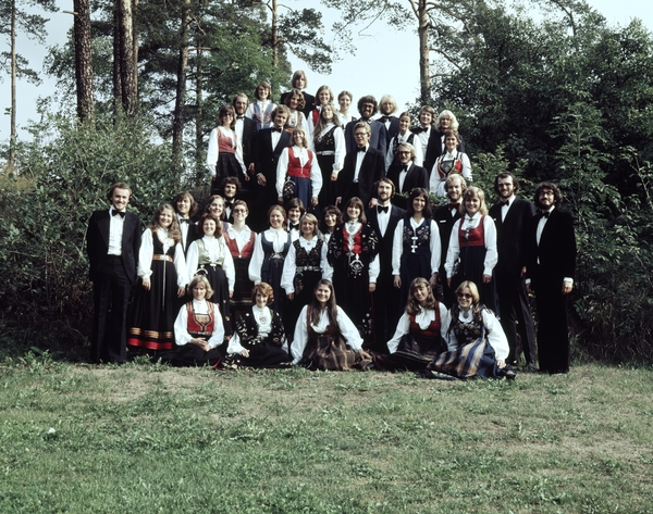 Grex Vocalis i 1975 avbildet utenfor Henie Onstad Kunstsenter på Høvikodden utenfor Oslo